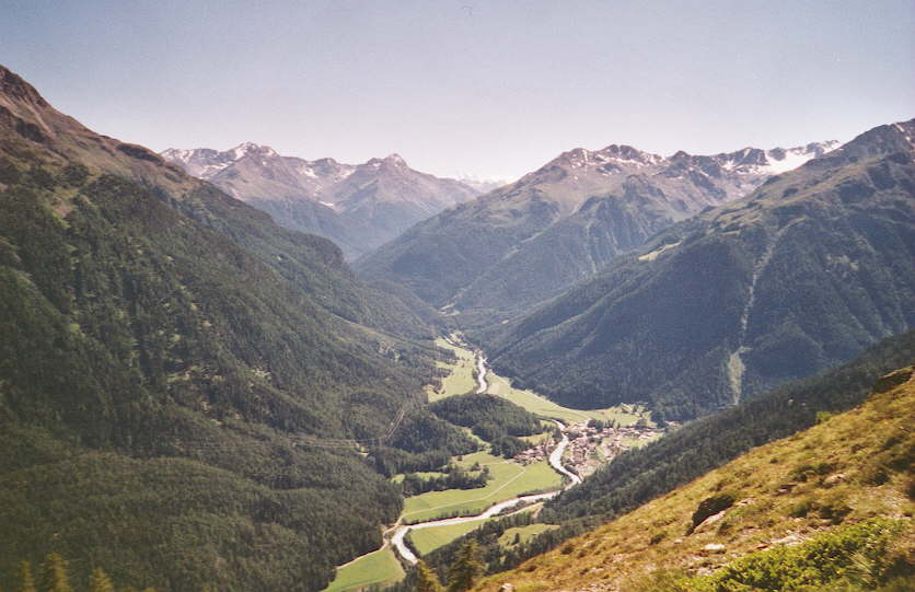 Blick von Sassauta herunter auf das Dörfchen Susch